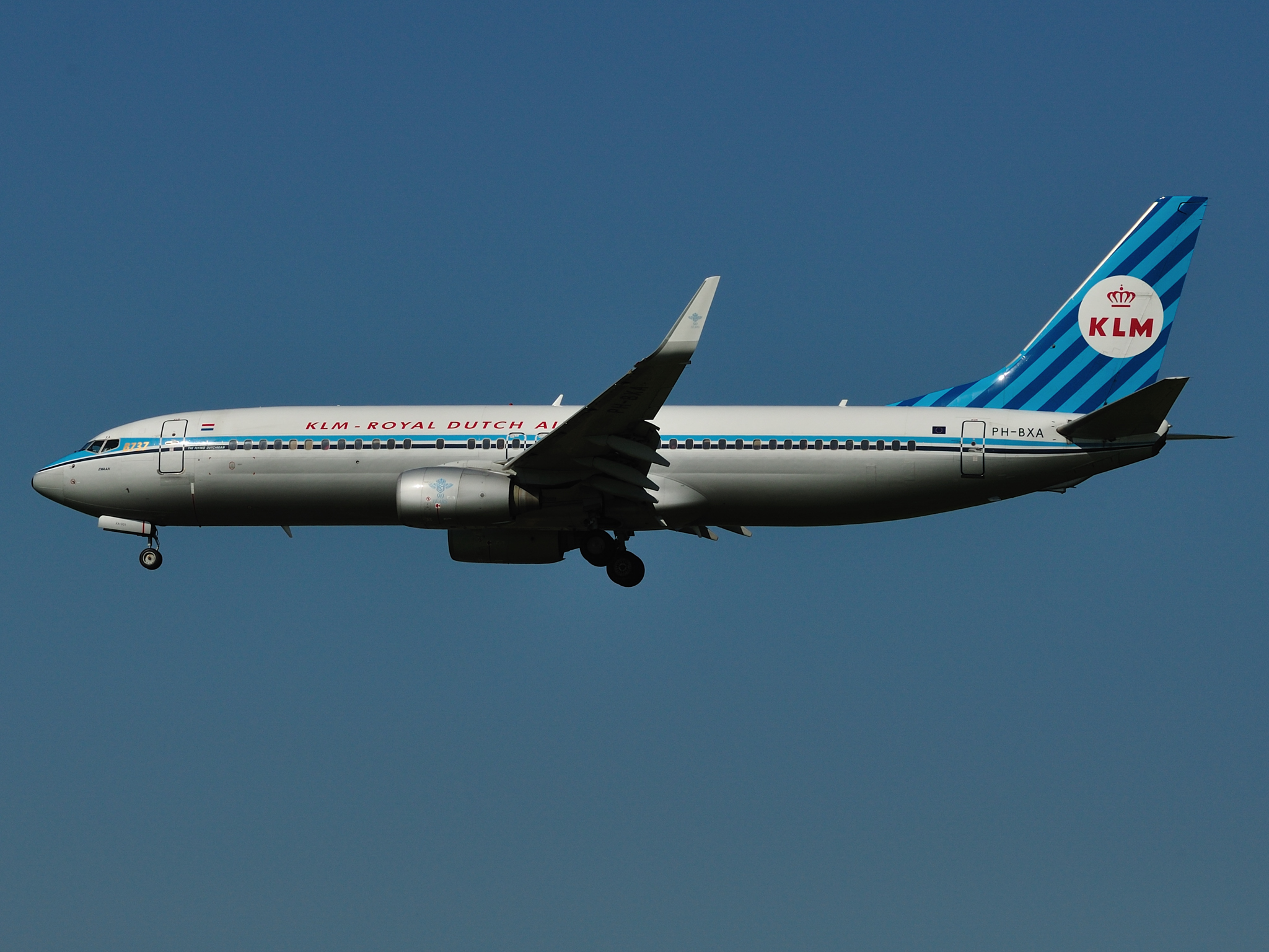 KLM Boeing 737-800 Retro colors reg. PH-BXA